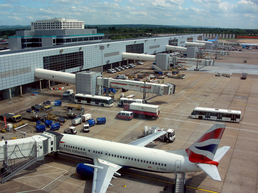 In der Überführung zum außen gelegenen Terminalteil. Siehe auch